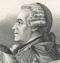 Axel Gabriel Leijonhufvud (1717-1789)